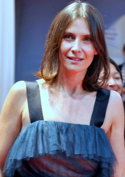 Géraldine Pailhas en 2010